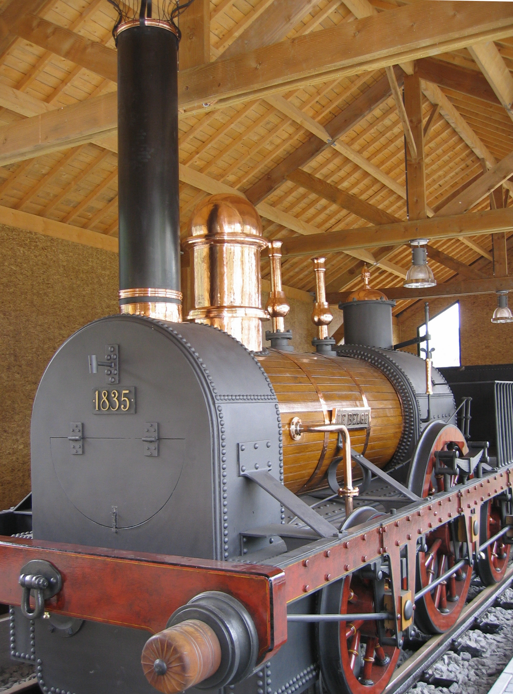 Vresse-sur-Semois: réplique de la locomotive «Le Belge», de John Cockerill